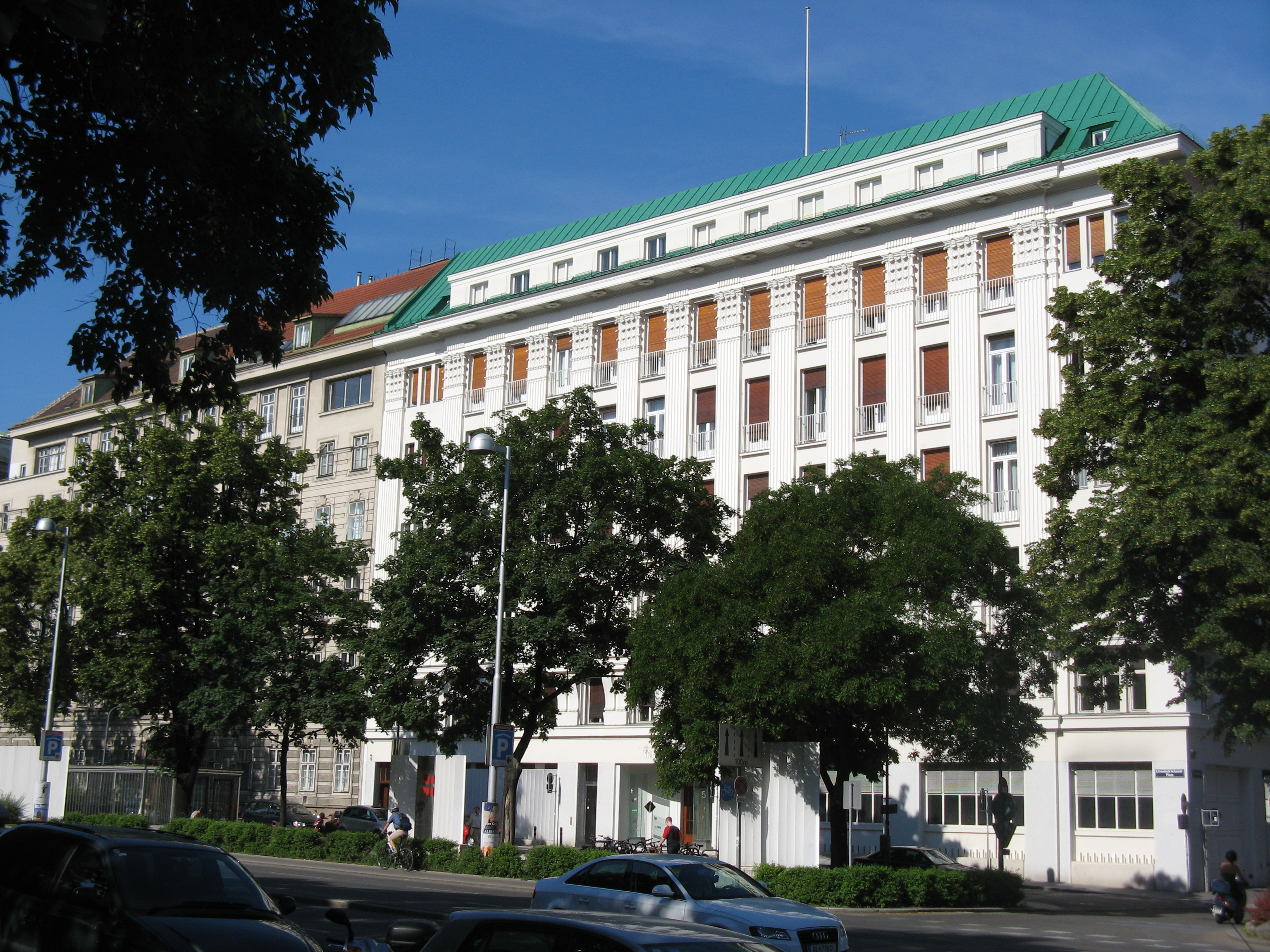 Friedrich-Schmidt-Platz 4 und 5, Wien-Josefstadt